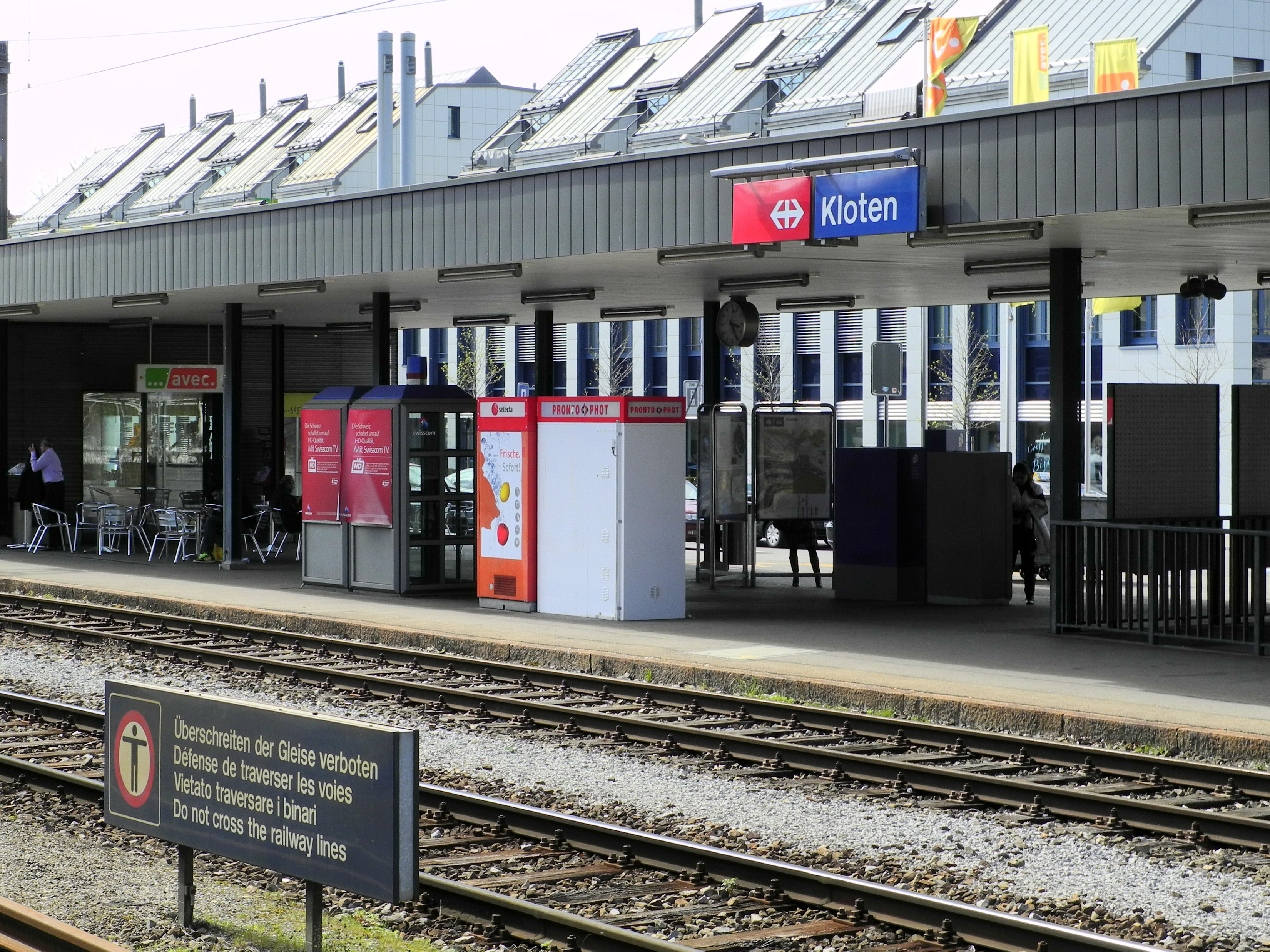 Bahnhof in Kloten (Switzerland)